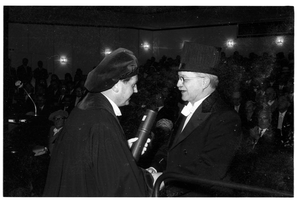 Zweiter Festakt in der Konzerthalle am Schloss. Die Rechts- und Staatswissenschaftliche Fakultät verleiht die Ehrendoktorwürde an den Ökonom Prof. Dr. Fritz Machlup (rechts) aus Princeton.